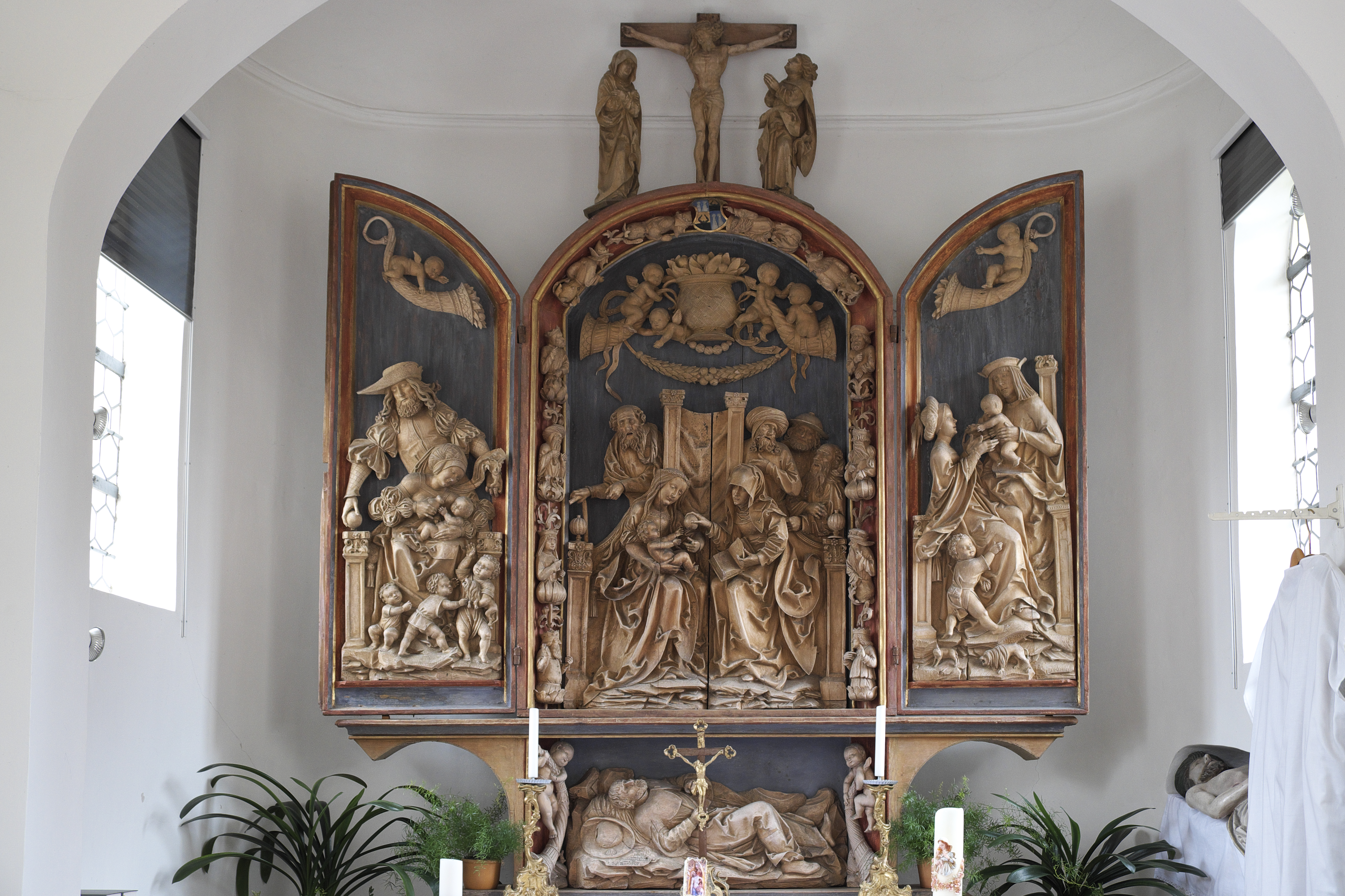 Altar mit der Darstellung der Heiligen Sippe in der katholischen Kapelle Franz Xaver in Bieselbach, einem Ortsteil von Horgau im Landkreis Augsburg (Bayern); aus Lindenholz geschnitzt von dem Bildhauer Daniel Mauch, um 1510